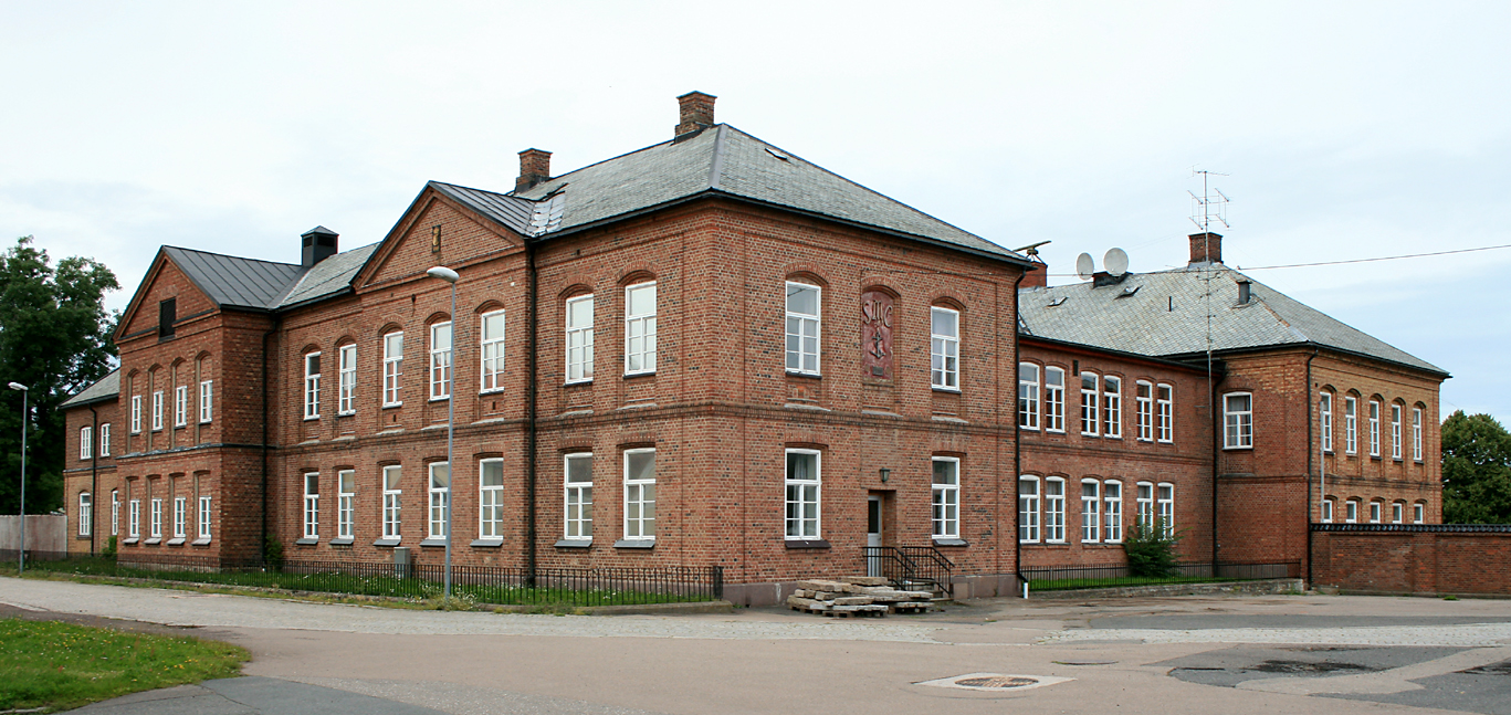 Skolebygg BSS, Karljohansvern, Horten.